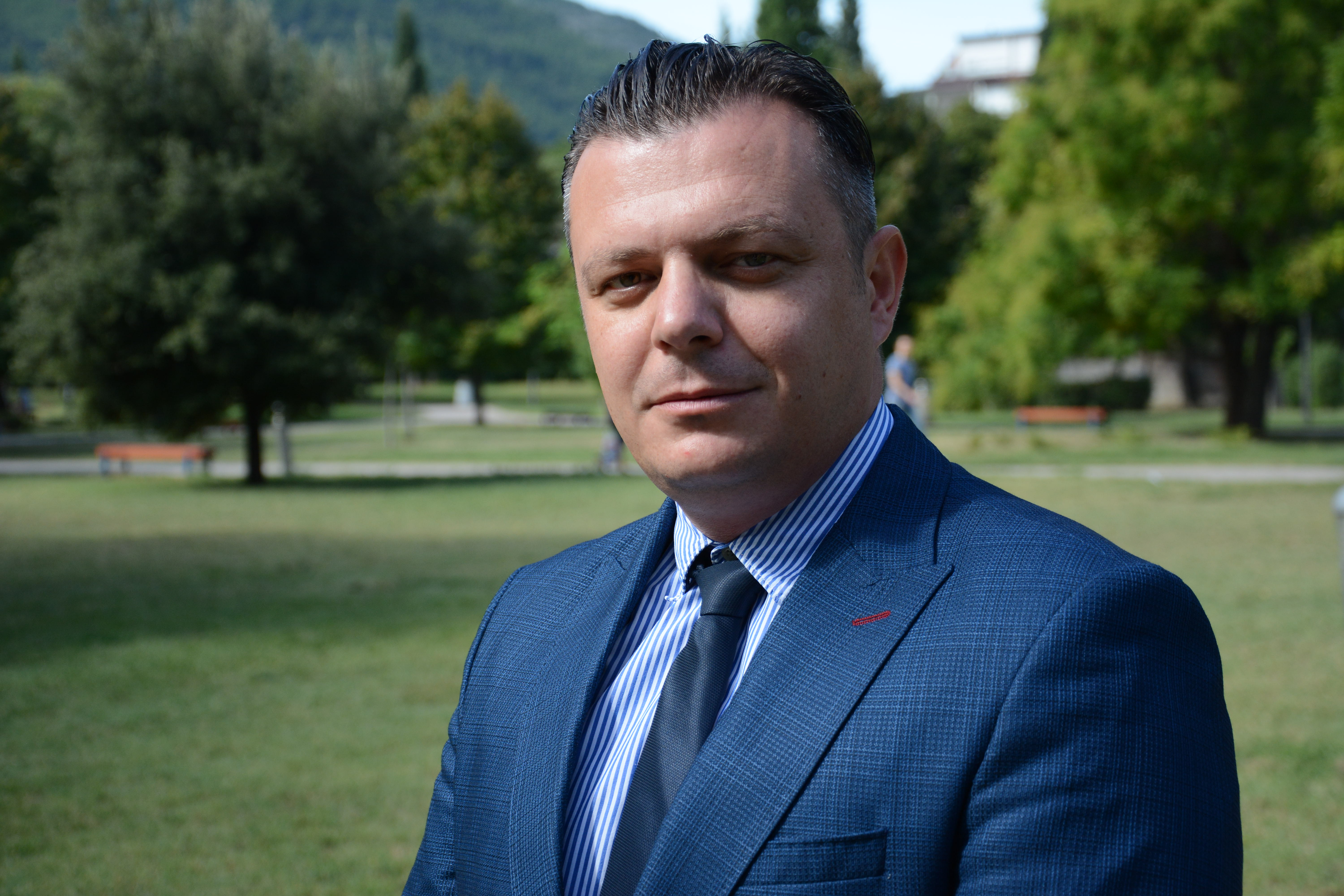 Dalibor Drlje